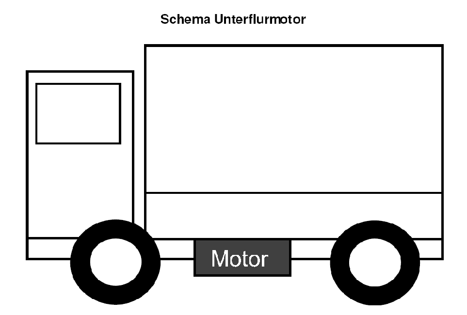 Beschreibung: Schema Unterflurmotor Quelle: selbst gezeichnet Zeichner: C-C-Baxter Datum: 2007